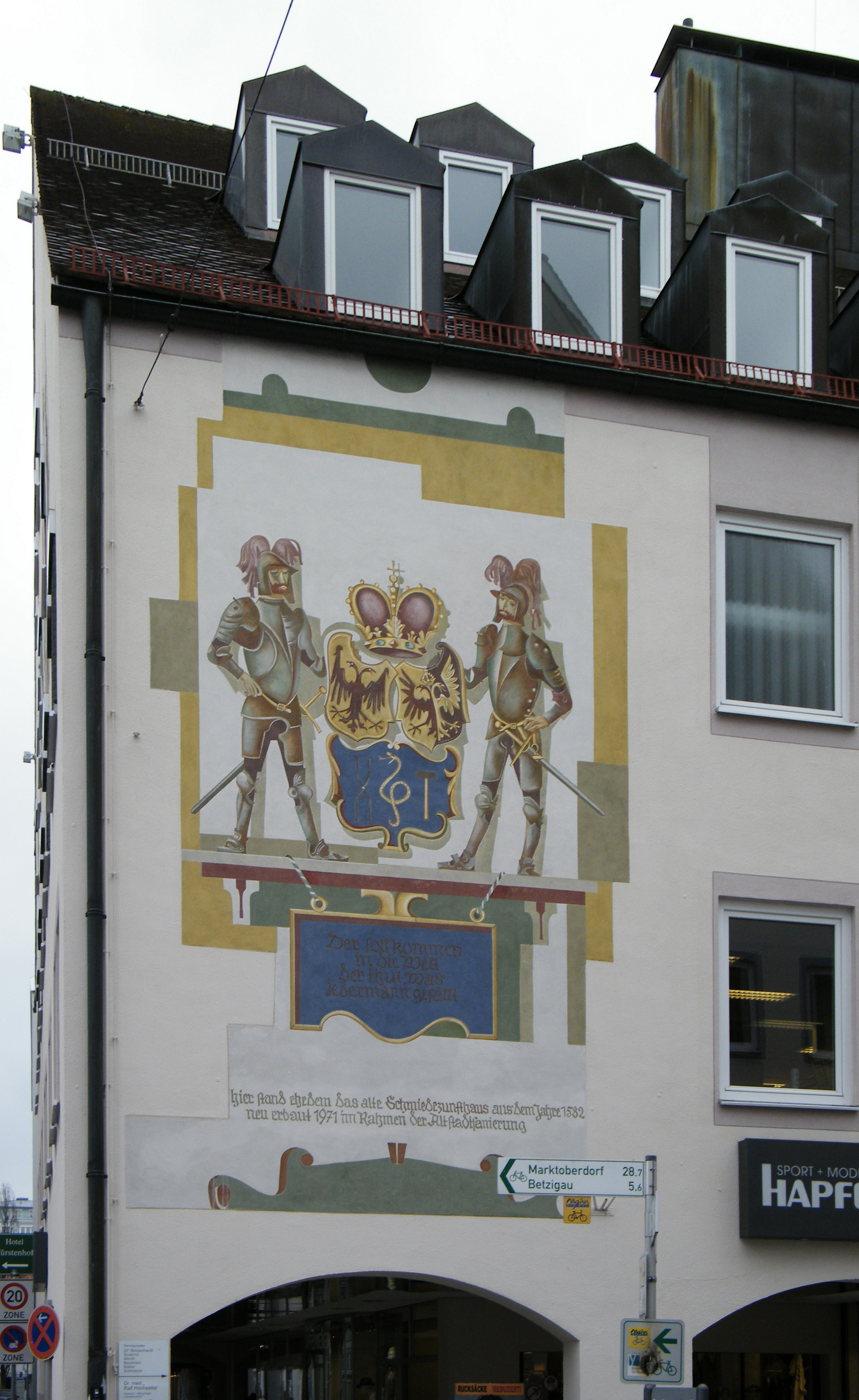 Neues Schmiedezunfthuas - Fresko von H.Zeller 1995